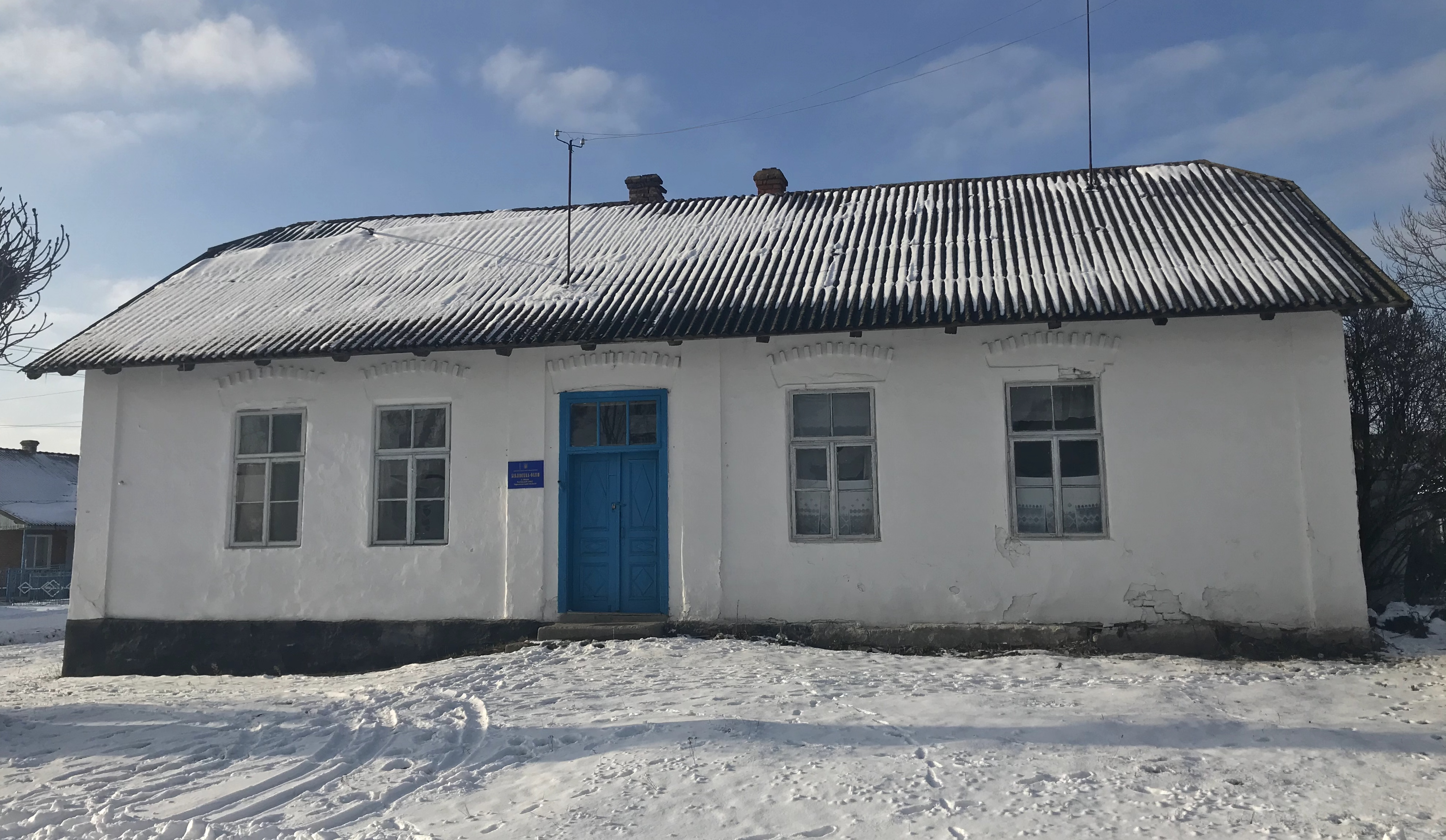 Діюча філія бібліотеки у с. Вівся Козівського району Тернопільської області